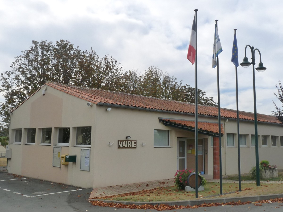 Mairie d'Avy, Charente-Maritime, France